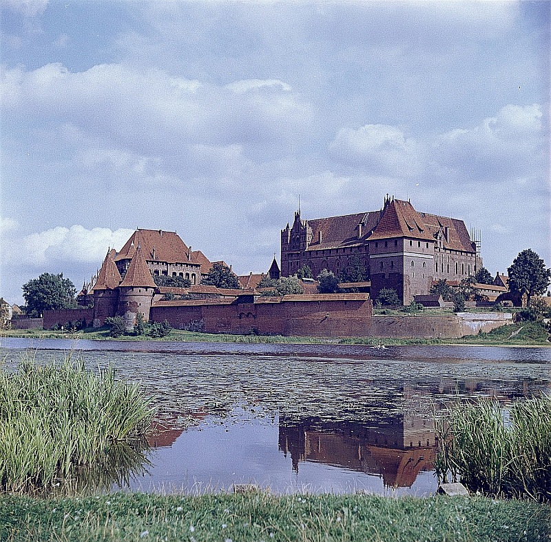 Original image description from the Deutsche Fotothek Marienburg (Kreis Marienburg). Ordensburg Marienburg